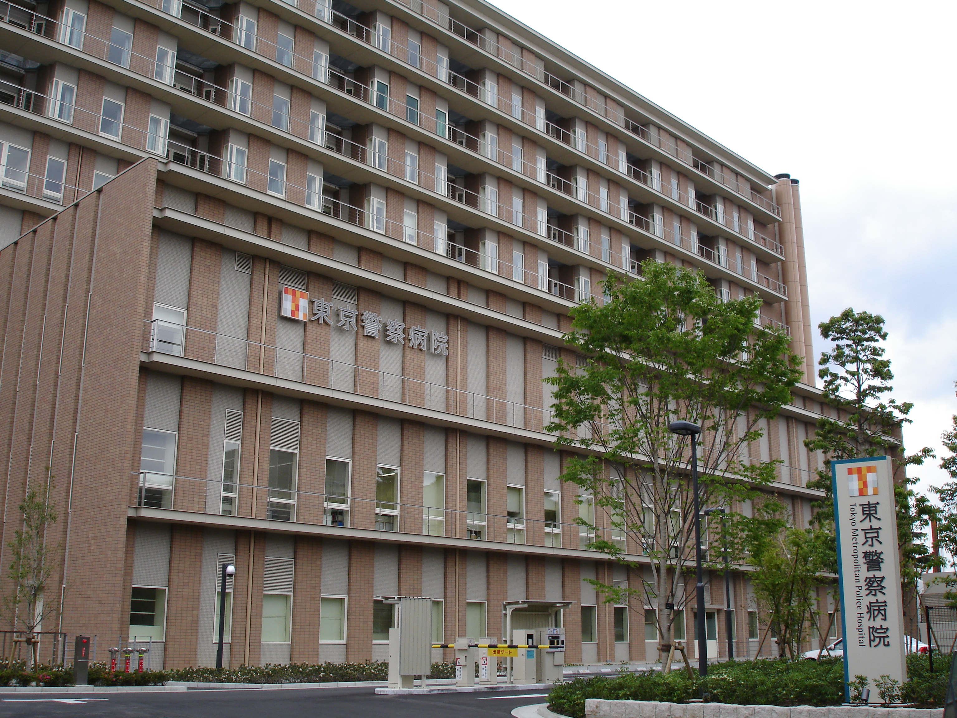 早稲田通り側入り口付近より撮影。住居表示:東京都中野区中野4丁目22番地1号。